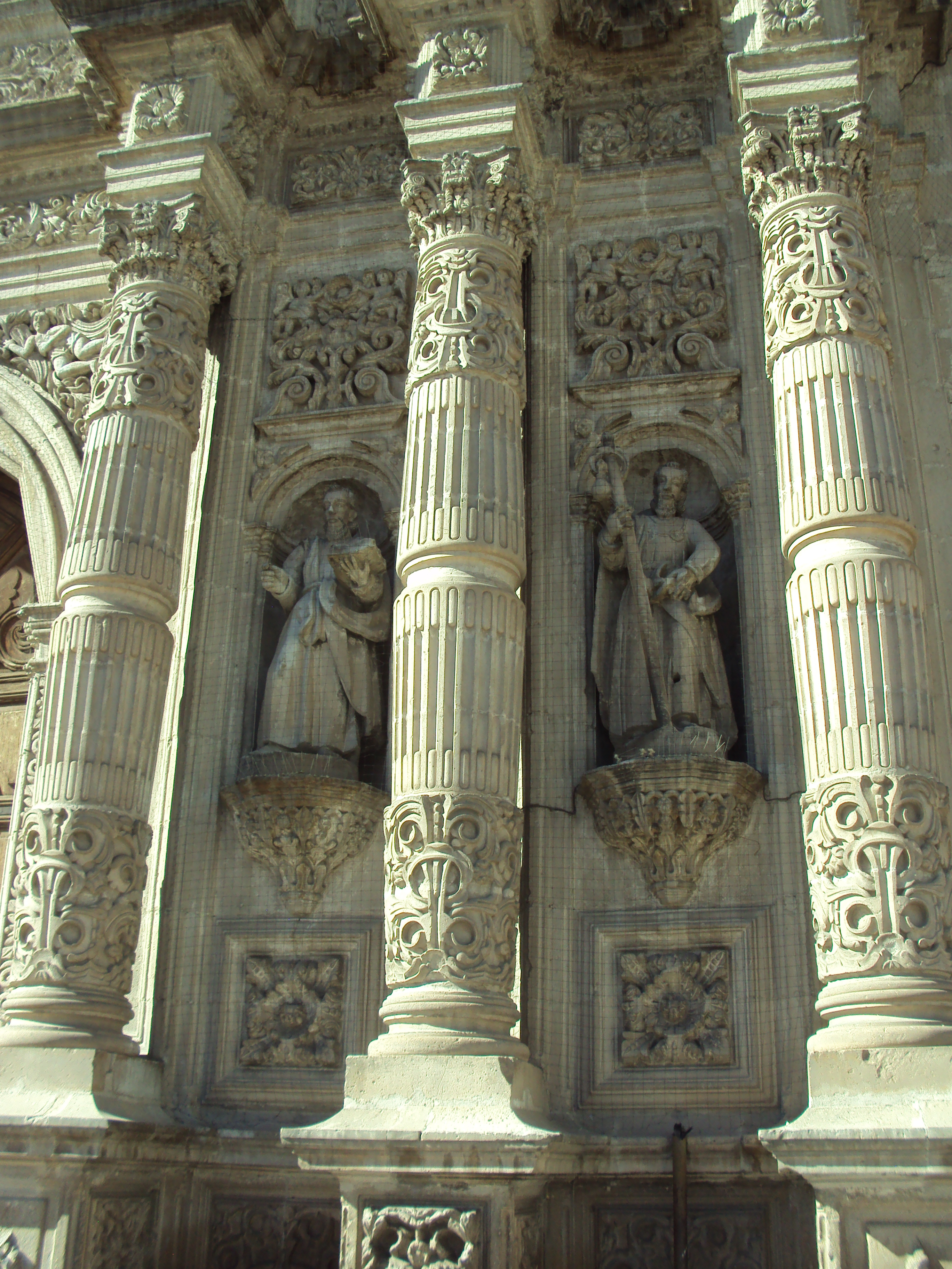 Detalle de la portada principal de la Catedral de Chihuahua